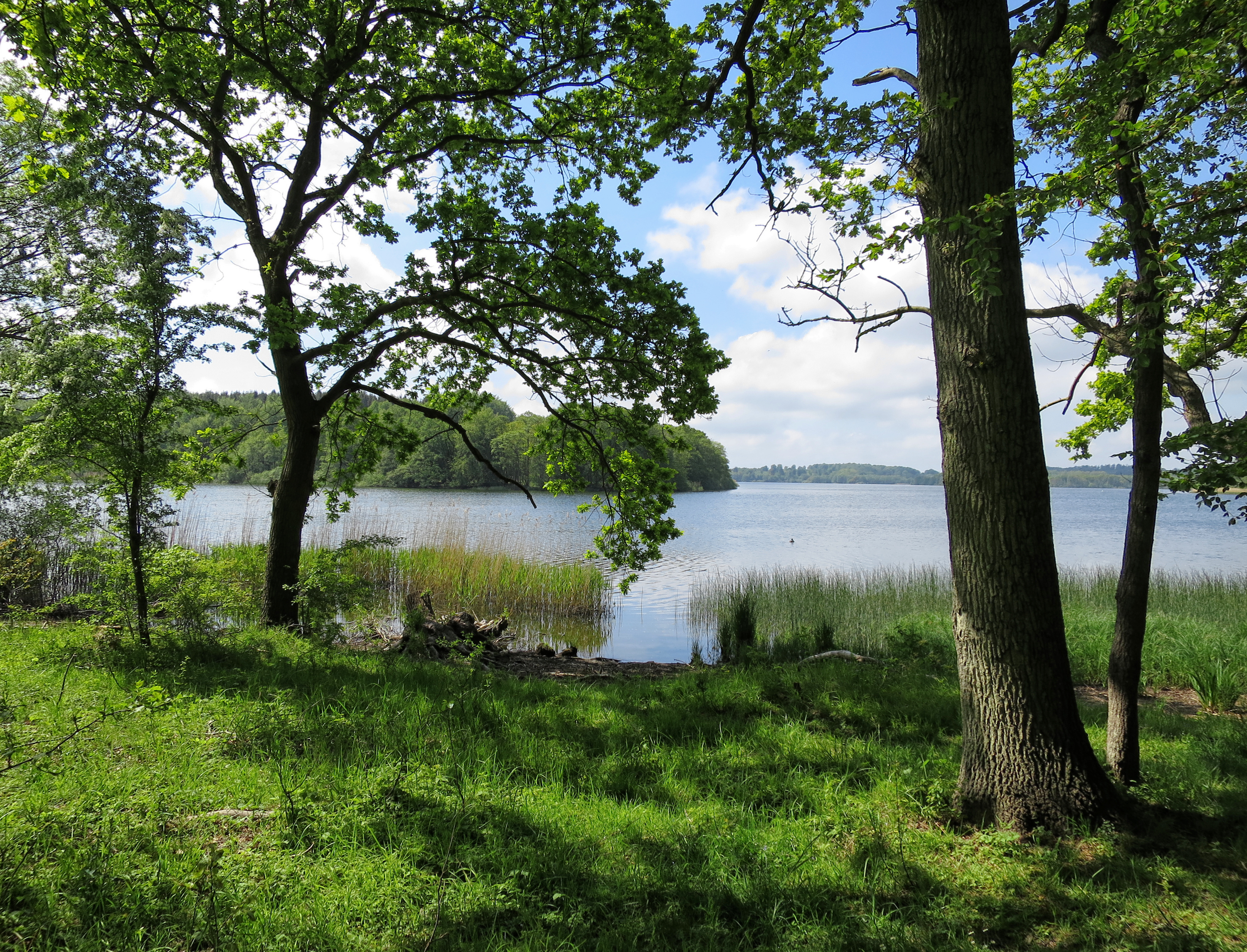 Udsigt over Skarresø i Jyderup